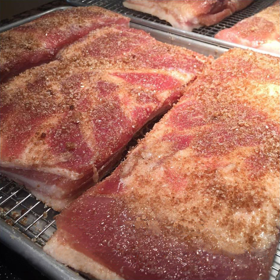 Trockenpökeln von Schweinebauch bei der Herstellung von durchwachsenem Speck, hier: mit Pökelsalz bedeckte Fleischportionen auf Abtropfgittern.